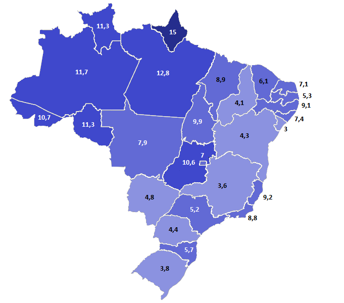 Percentual da população membro da Assembleia de Deus por estado no Brasil